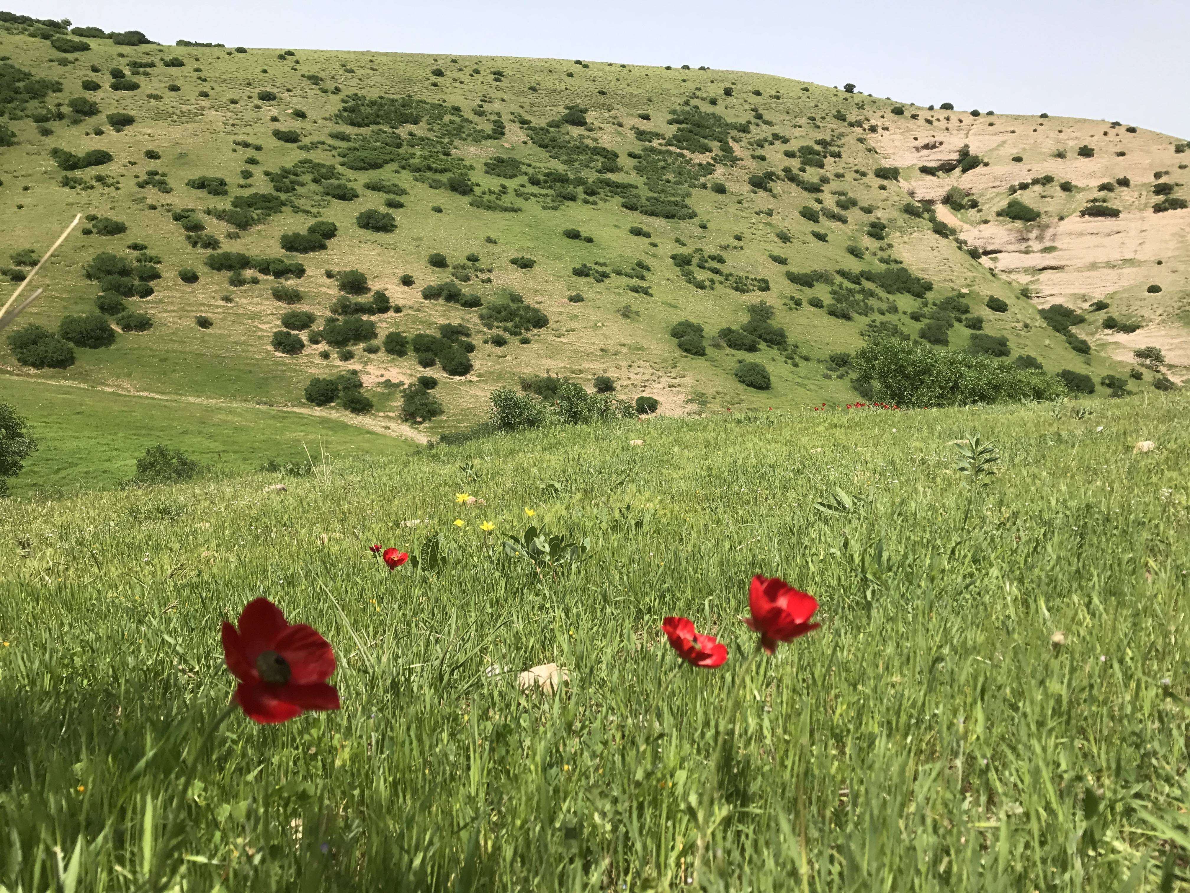 مصیف هناره فی محافظة أربیل في شمال العراق